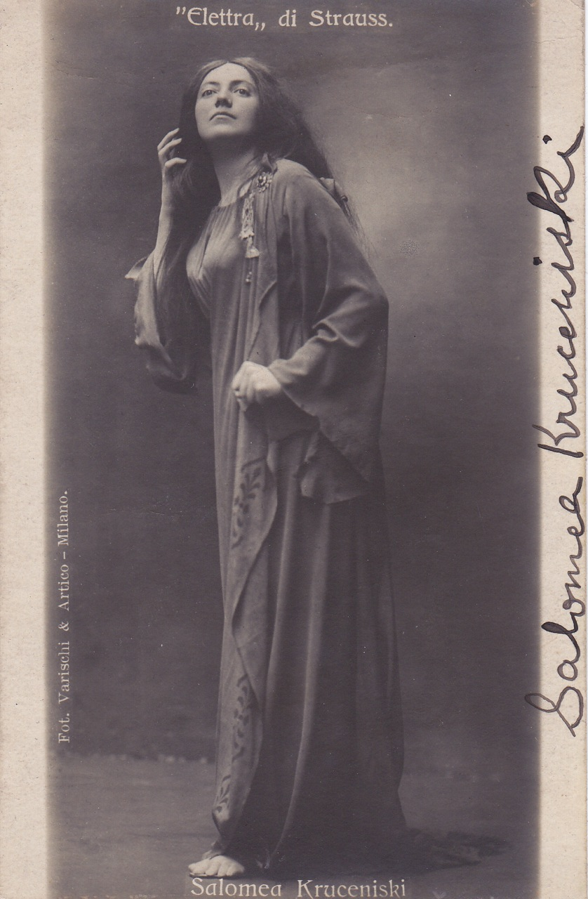 Соломія Крушельницька в ролі Електри в опері Штрауса